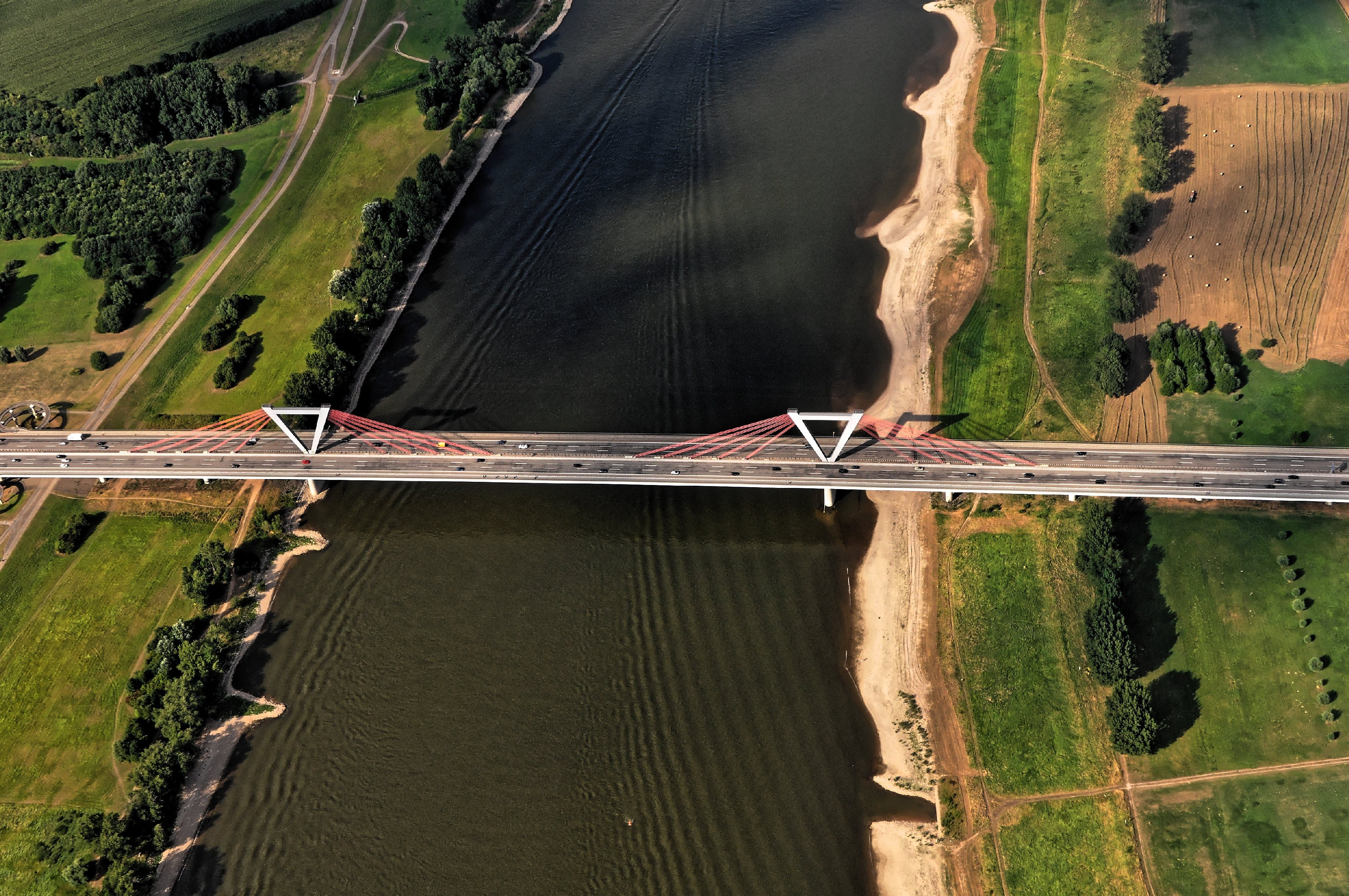 Bilder vom Flug -Rom-Düsseldorf-Hamburg 2013 Dieses Foto entstand in Zusammenarbeit mit Stadtbesichtigungen.de Die Seiten Stadtbesichtigungen.de, der dazugehörige Reise Blog sowie die Facebookseite: Stadtbesichtigungen Rom dürfen dieses Bild für Ihre Veröffentlichungen ohne den Hinweis auf Wikipedia, Commons bzw der Lizenz verwenden. Die Verantwortlichen habe von mir (Ra Boe) die Originaldaten zur freien Verfügung übermittelt bekommen.